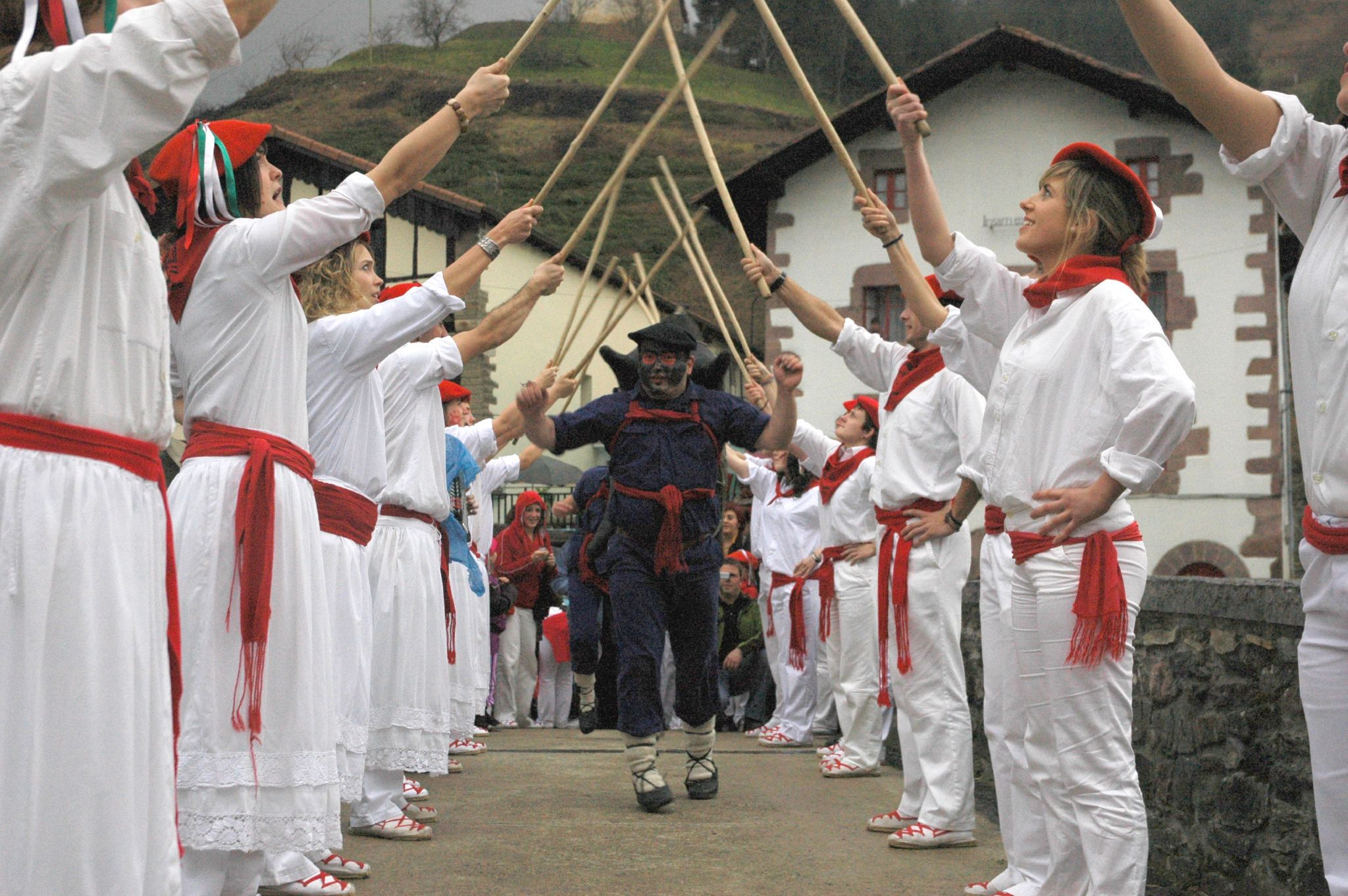 Zahagi dantzan, Goizuetan. 2006an eginiko argazkia